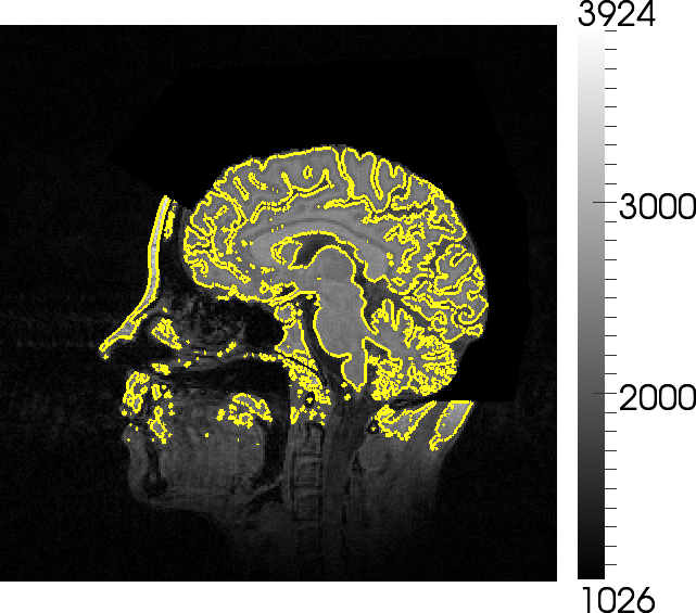 Isolinhas em uma fatia do cérebro humana